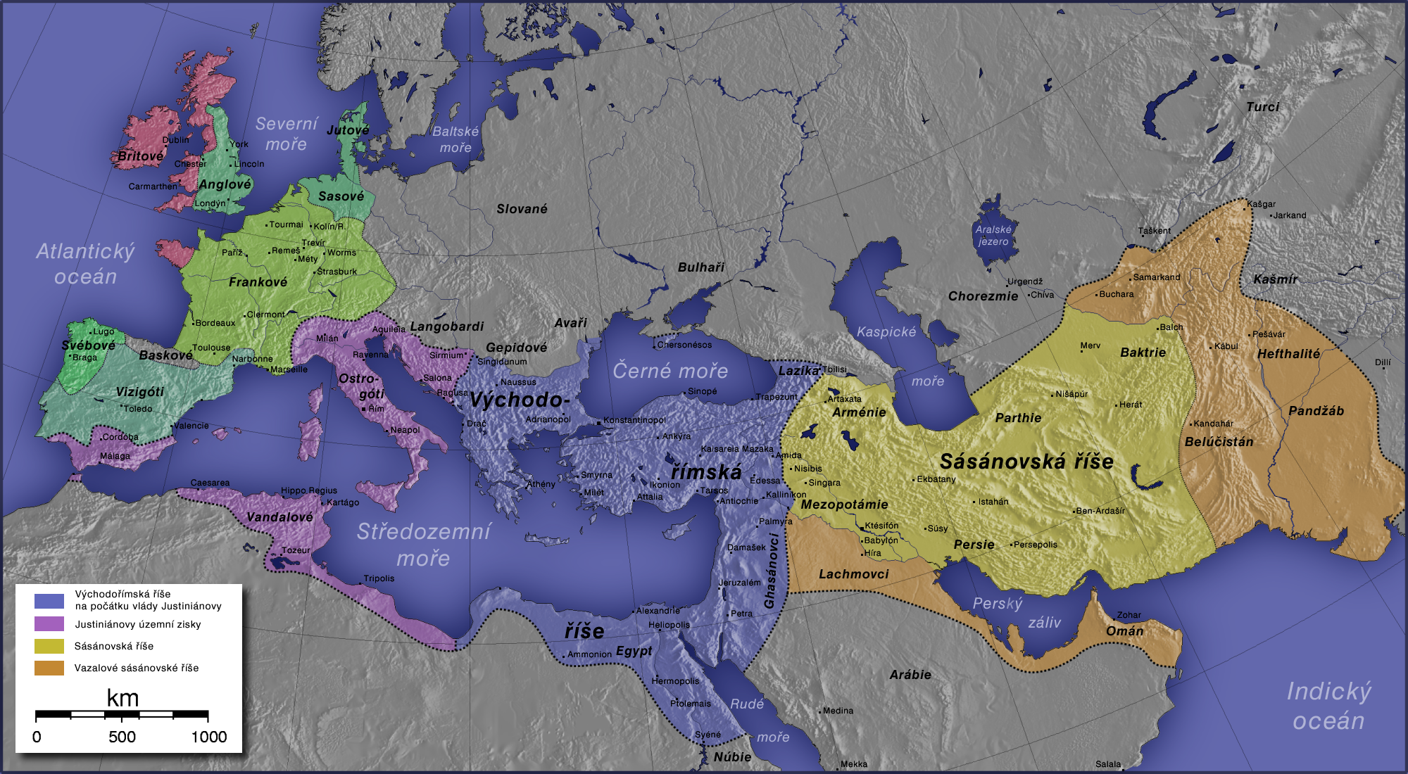 Rozsah východořímské a sásánovské říše v době Justiniánově. Český překlad mapy poskytnuté cs::de:Benutzer:Captain Blood.